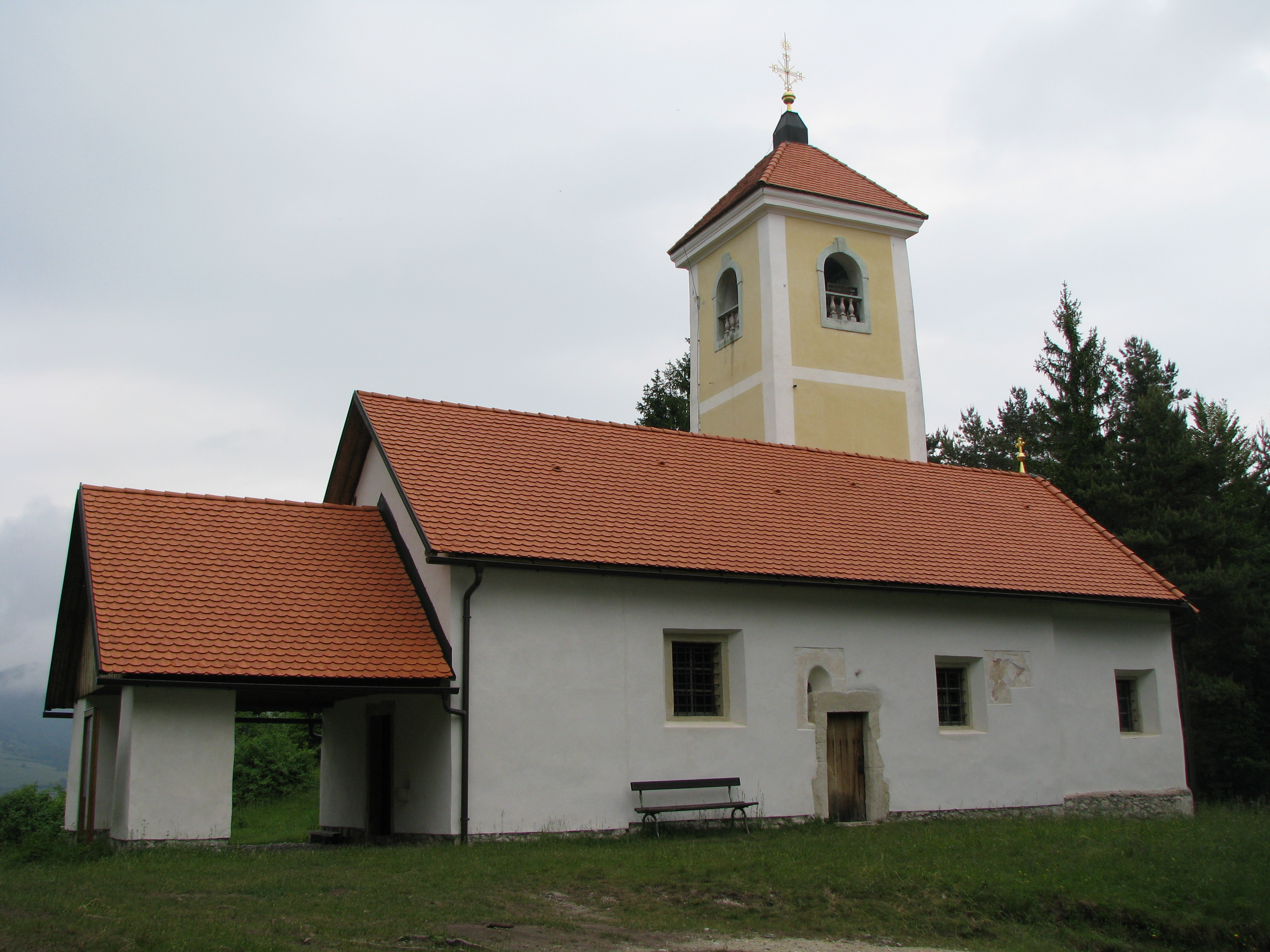 Cerkev svete Neže na Golčaju, občina Lukovica